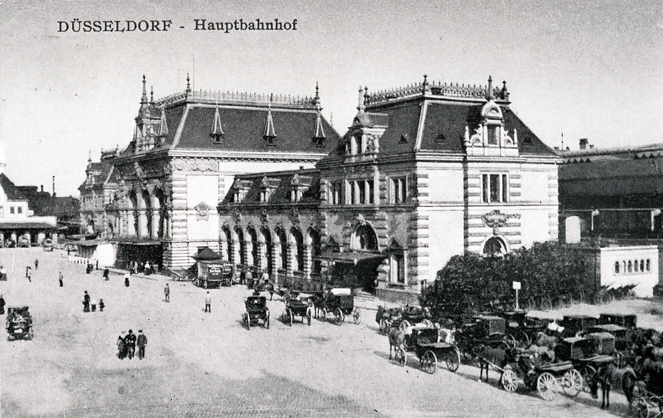 Alter Hauptbahnhof Düsseldorf um 1900